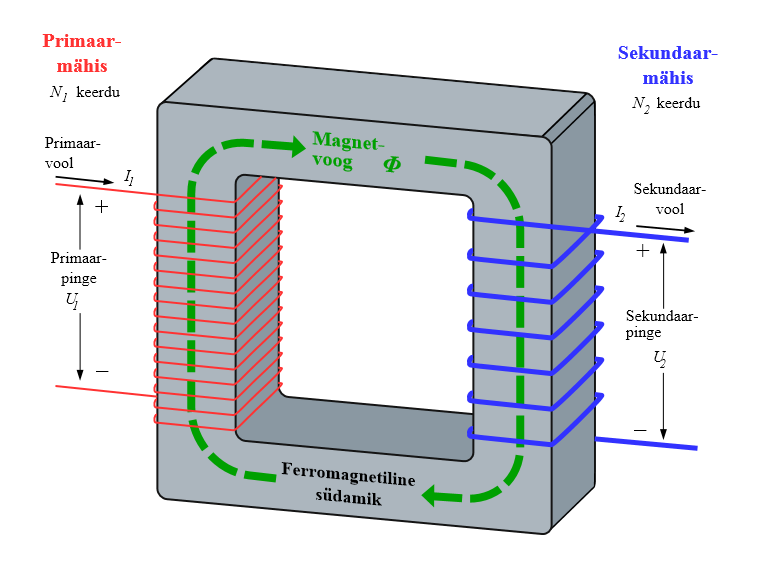 Trafo ehituspõhimõte